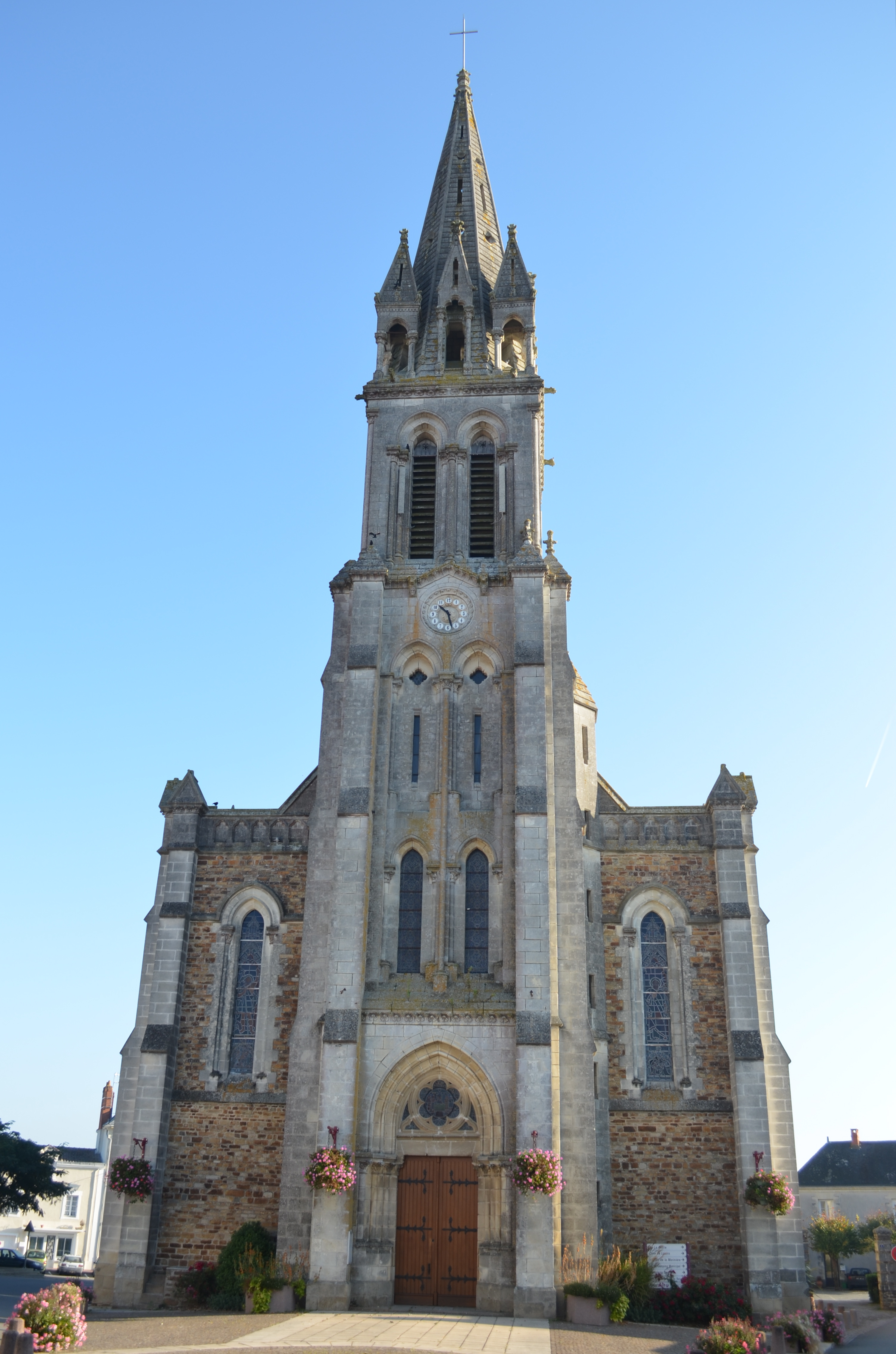 Eglise - Port-Saint-Père (Loire-Atlantique)